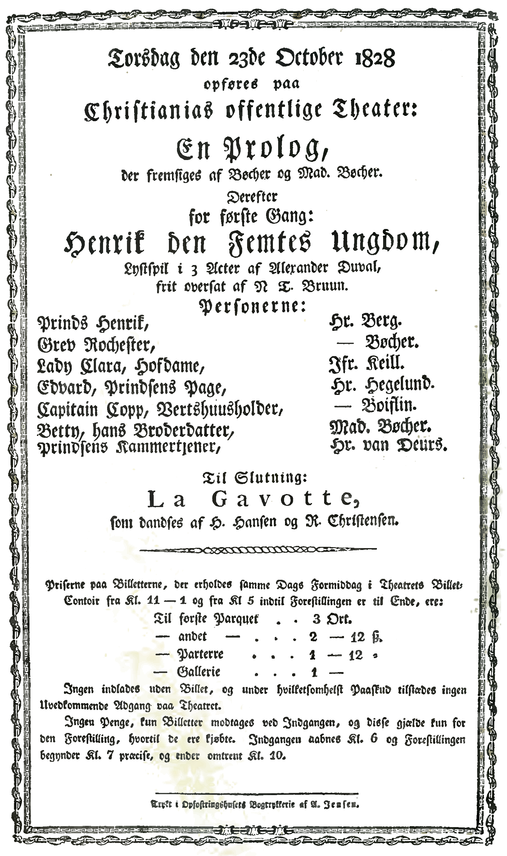 Teaterplakat for et stykke av Alexandre Duval ved Christiania Theater 23. oktober 1828.